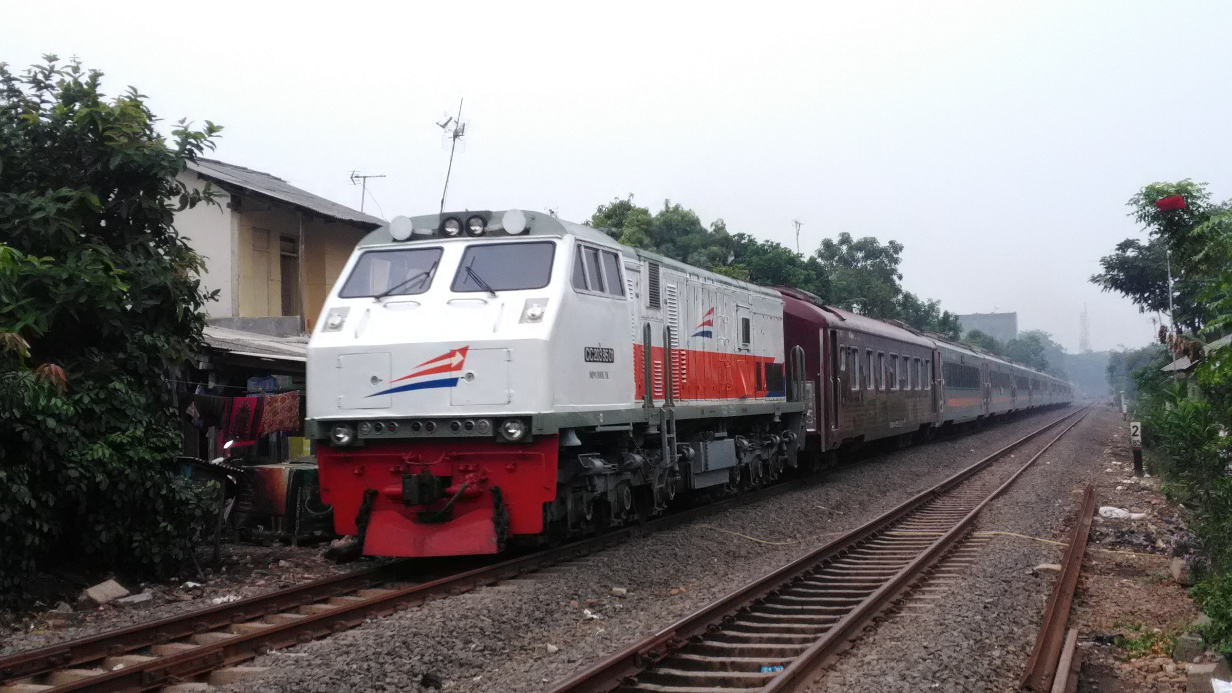 Sunda: KA 138 Fajar Utama Solo ngaliwat di daérah Pucung, Kotabaru